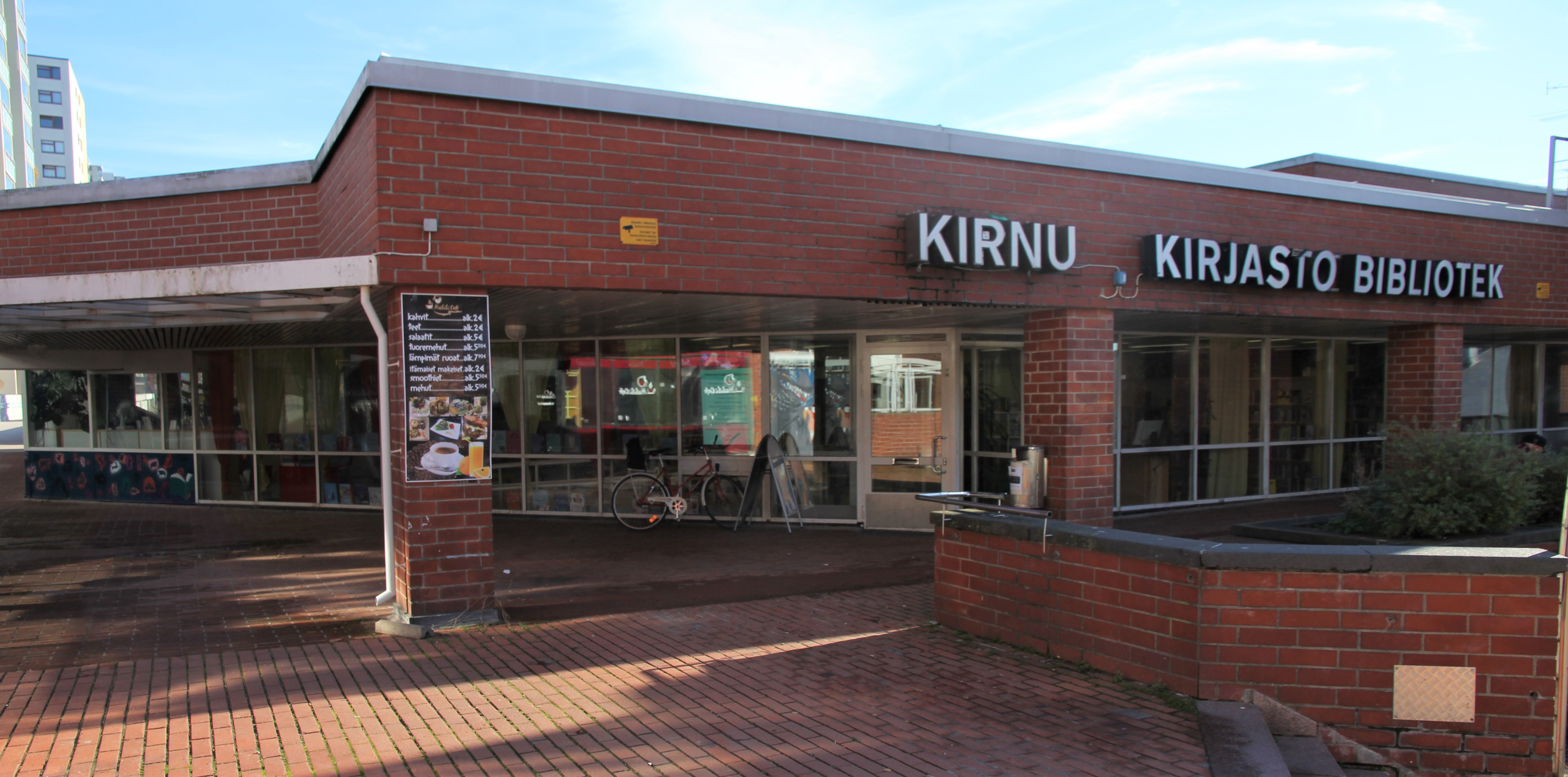 Koivukylän kirjasto (kuvassa) toimi aiemmin (10/2019 saakka) Vantaan Havukosken kaupunginosassa, osoitteessa Hakopolku 2. Kuva lokakuulta 2018.